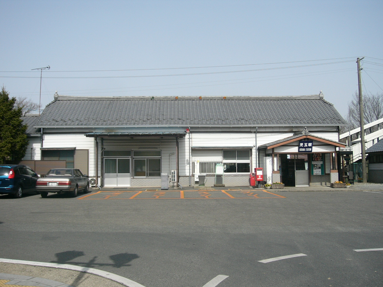 Kodama Station